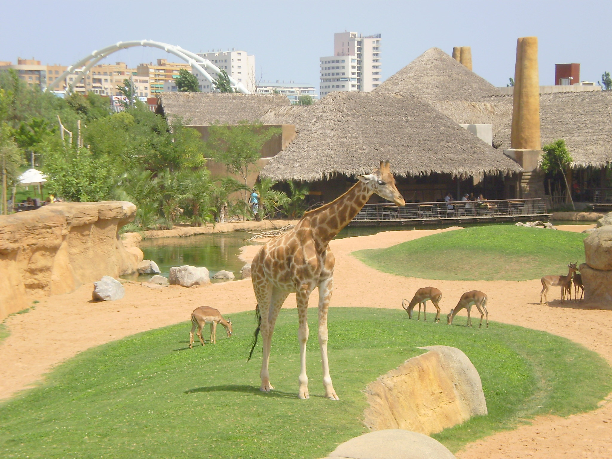 Esta foto es del Bioparc, me parece que es representativa, ya que se ve un ambiente natural, selvatico dentro de la ciudad. Si, los animales de fondo son Antilopes; (Impala, Blesbok, Kudu mayor)